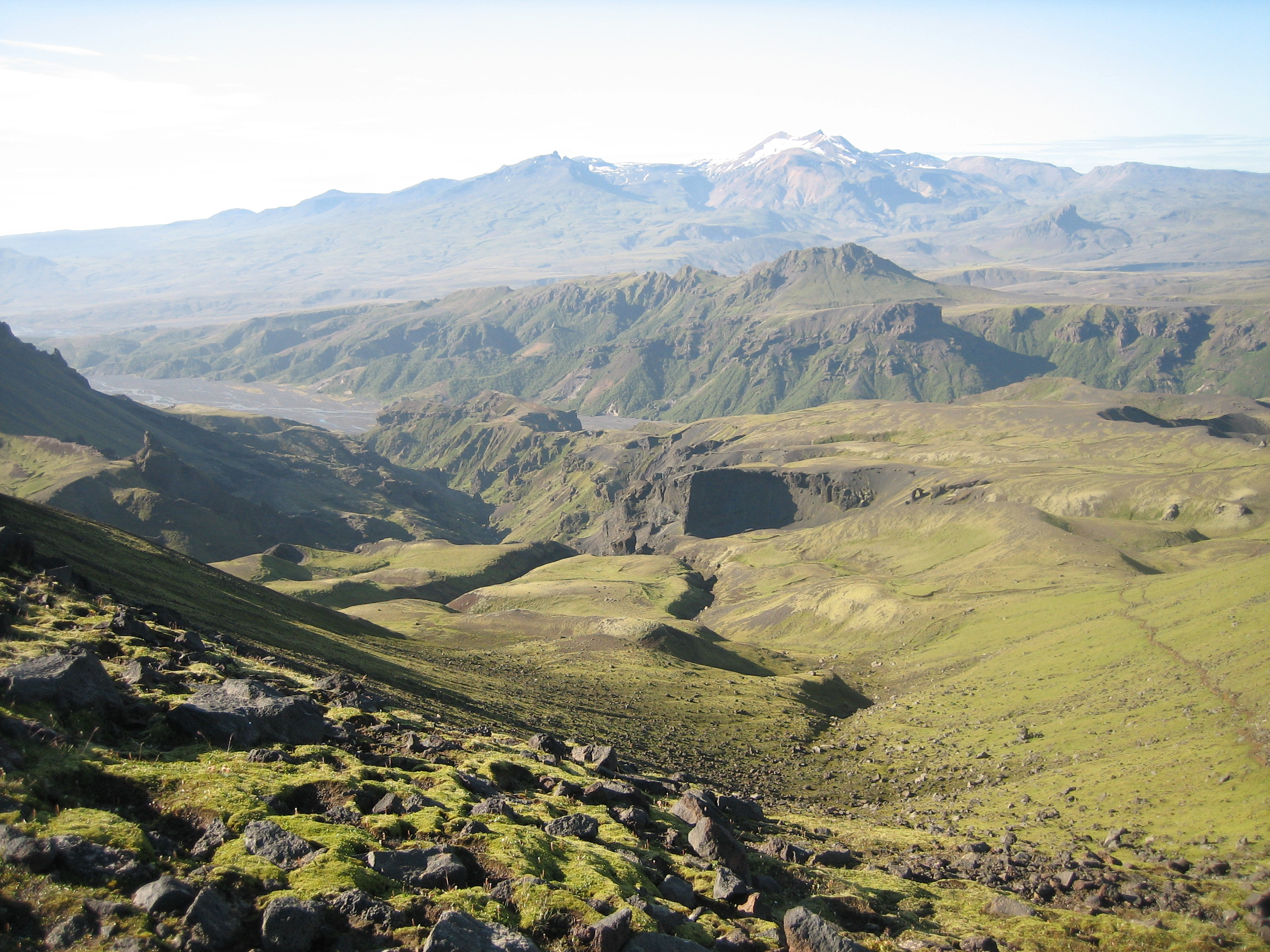 Horft inn í Bása. Mynd tekin af Ólöfu sumarið 2006. Básar in Þórsmörk, Iceland. Photo by Ólöf Björnsdóttir 2006.Básar:Ólöf Björnsdóttir